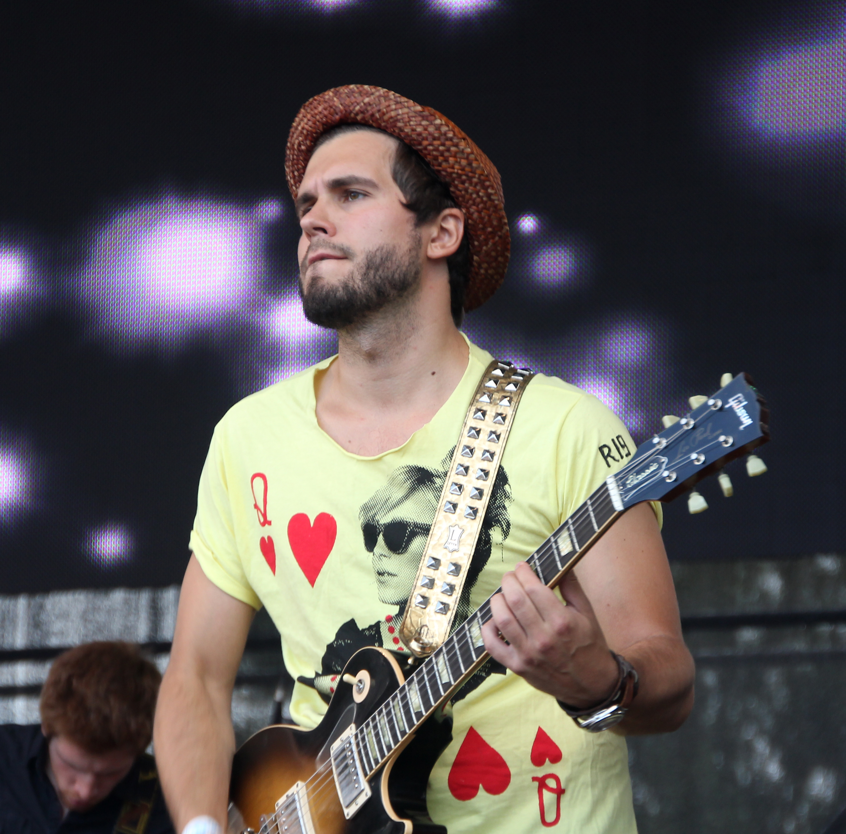 Robert Vaigla Tallinna Merepäevadel 2011